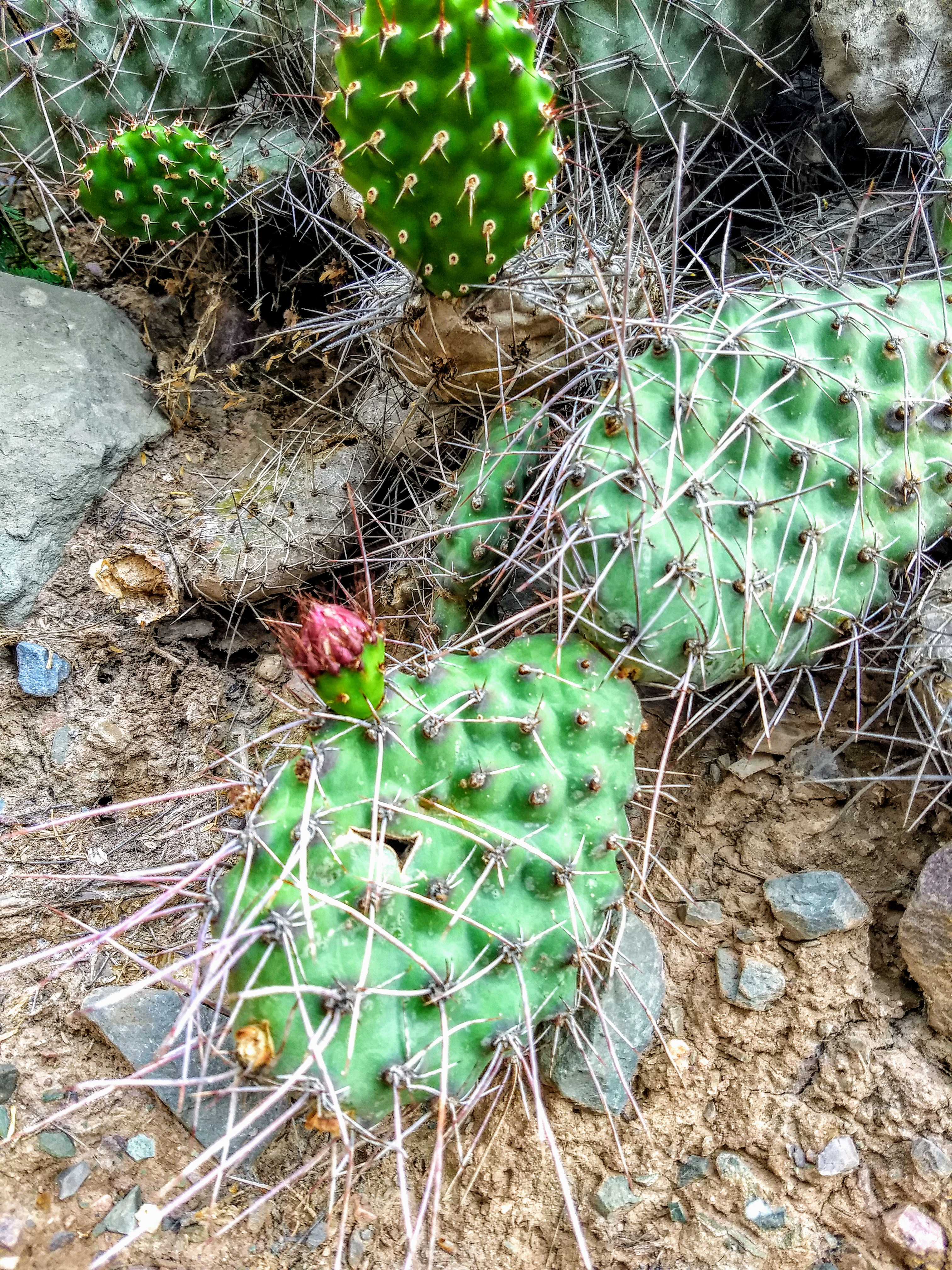 oto tomada a un cactus florecido creciendo entre rocas en el camino al mirador del pueblo de Iruya.